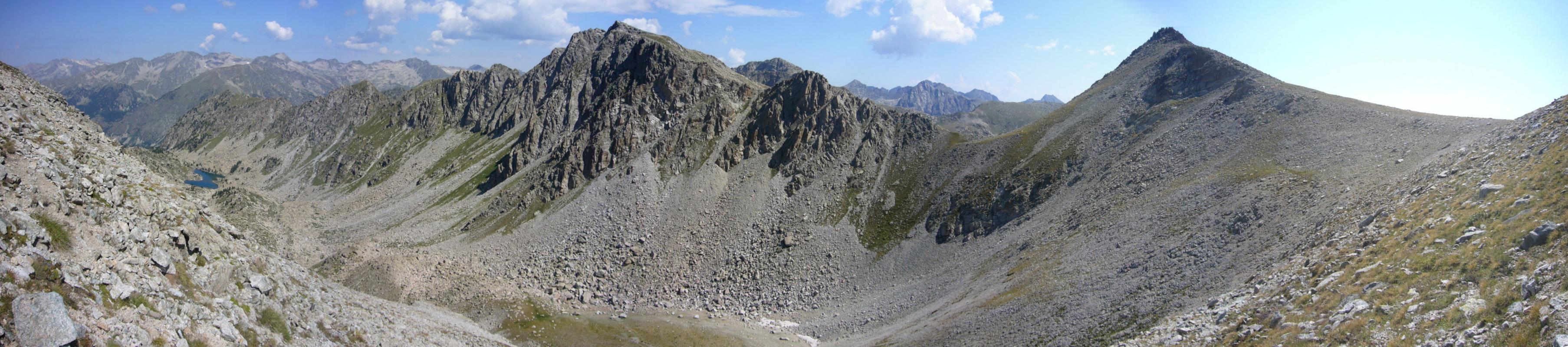 Vall de les Mussoles vista des del Pas Ample; la Vall de Boí, Alta Ribagorça, Catalunya